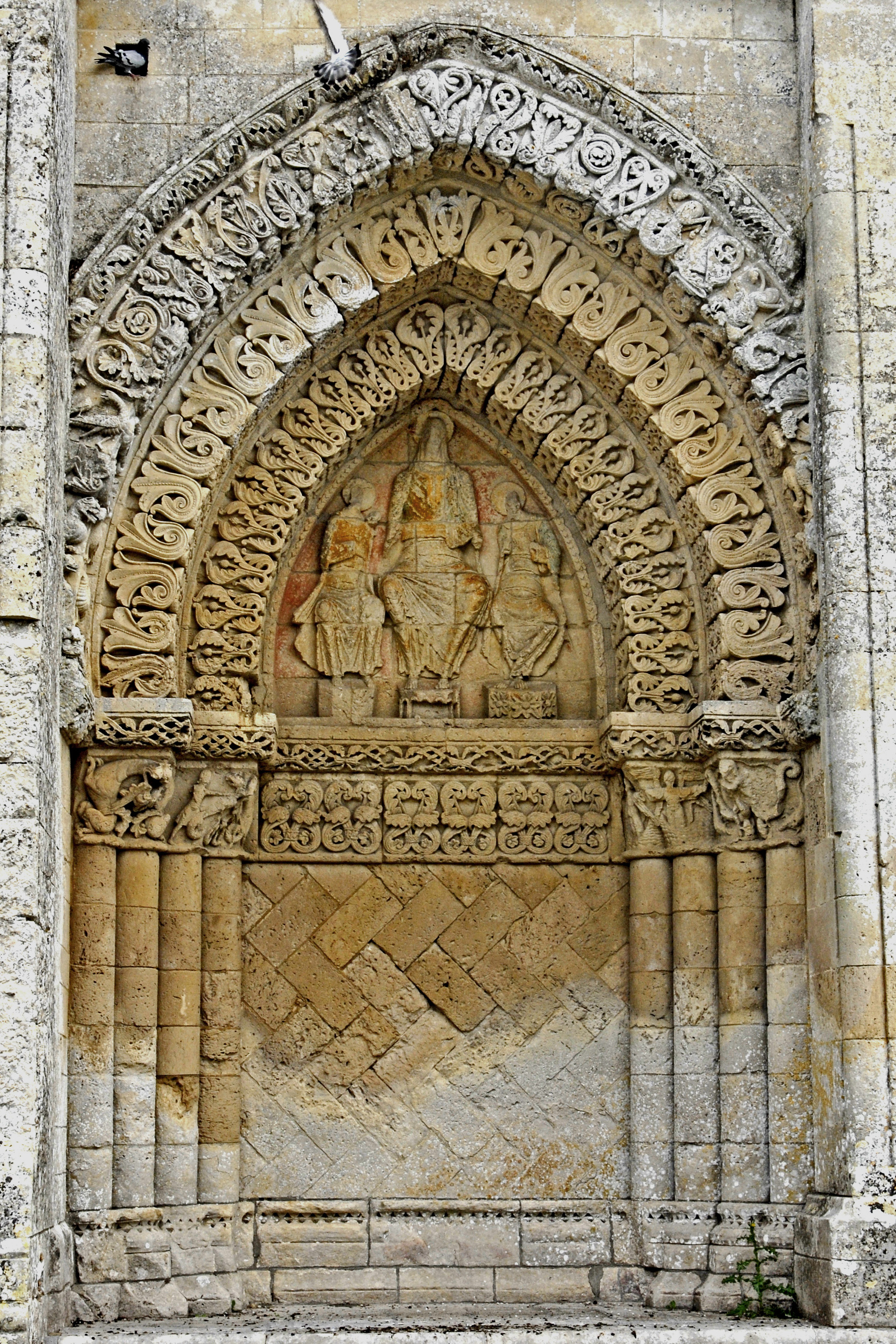 St.-Pierre Aulnay, rechtes Scheinportal